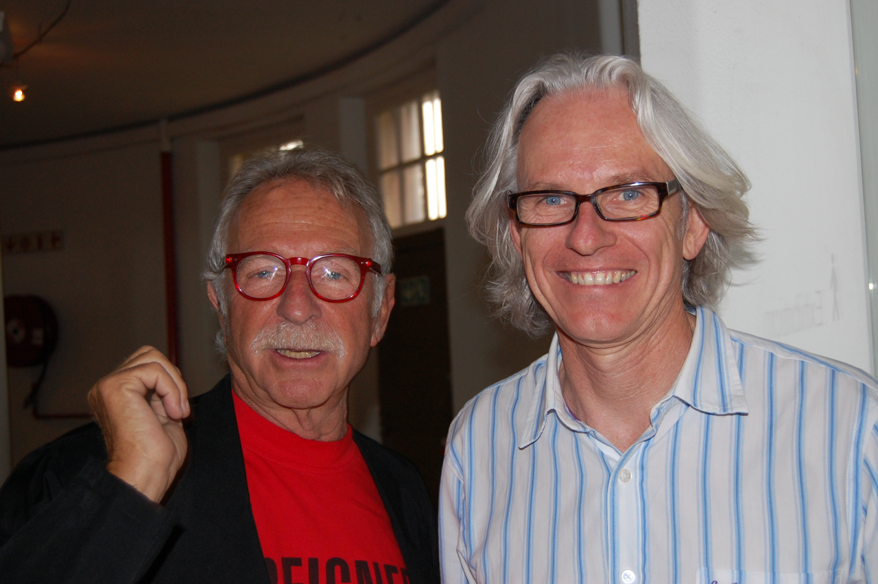 Jo Menell and Angus Gibson at Festival de Cine Africano de Córdoba